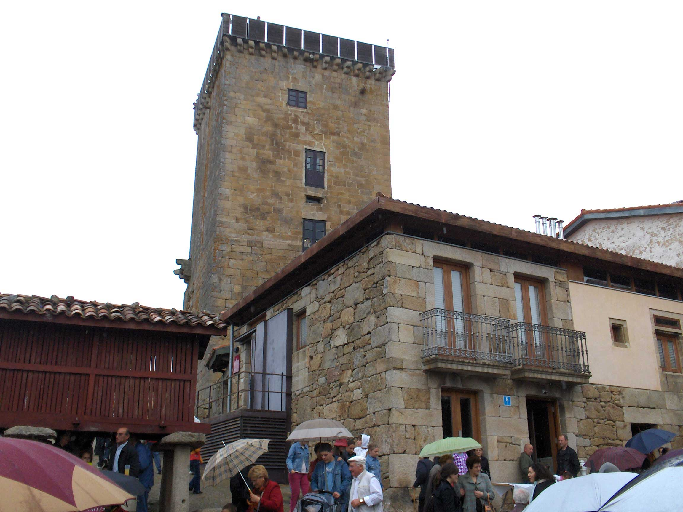 gl: 17 de mayo de 2008, Vilanova dos Infantes, Celanova, Ourense, Galicia. Romaría Etnográfica Raigame